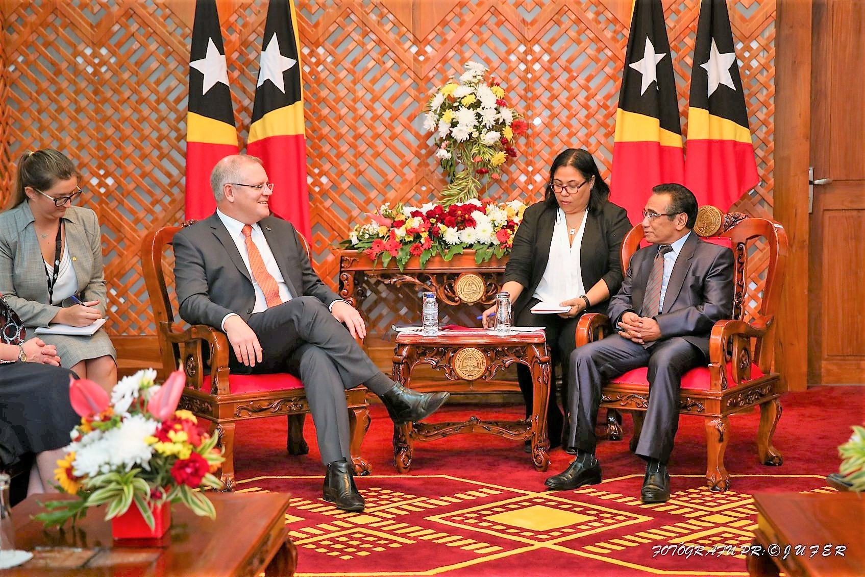 Australiens Premierminister Scott Morrisson besucht Osttimors Präsident Francisco Guterres